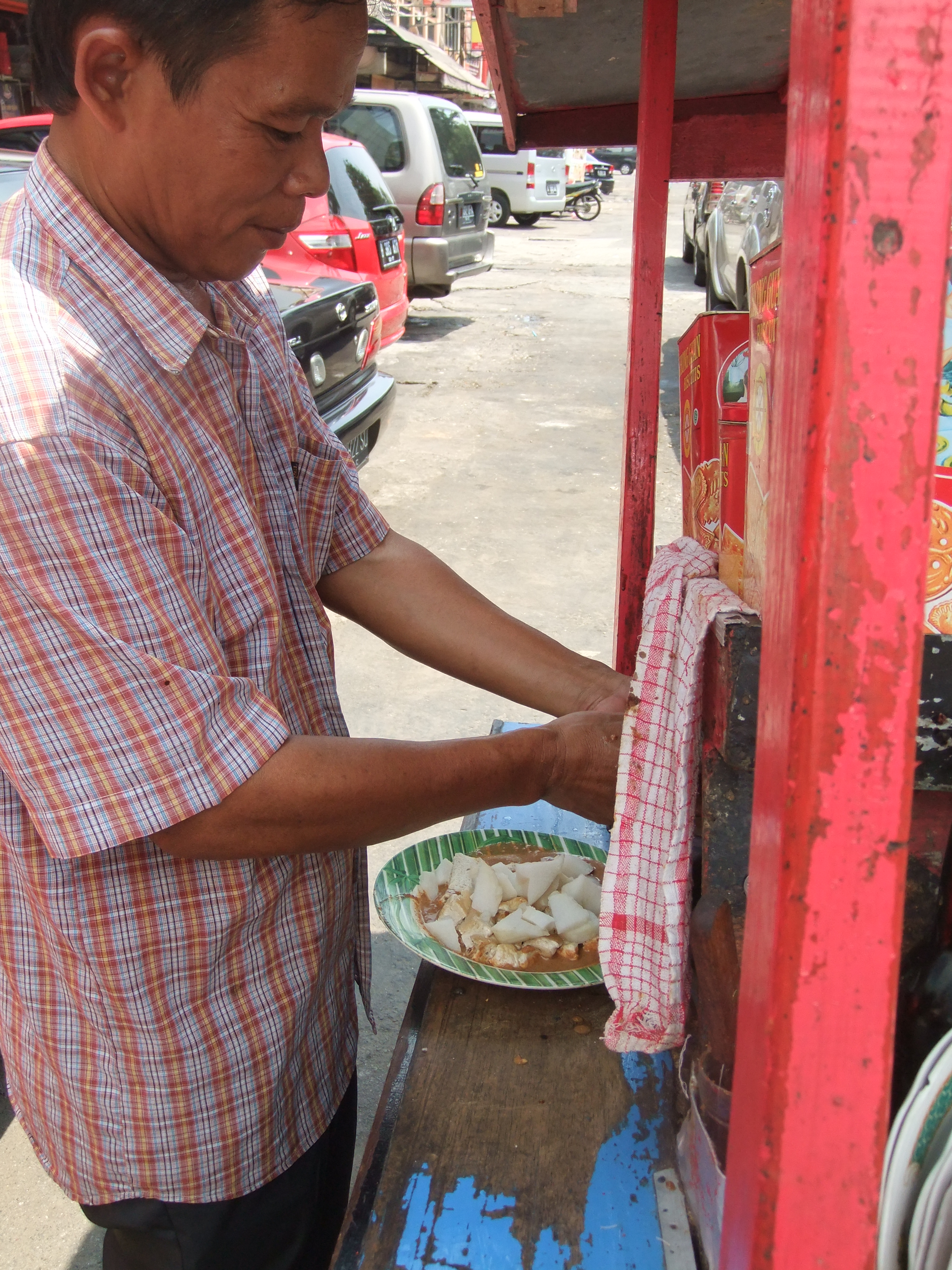 Ketoprak dan penjualnya di Jakarta